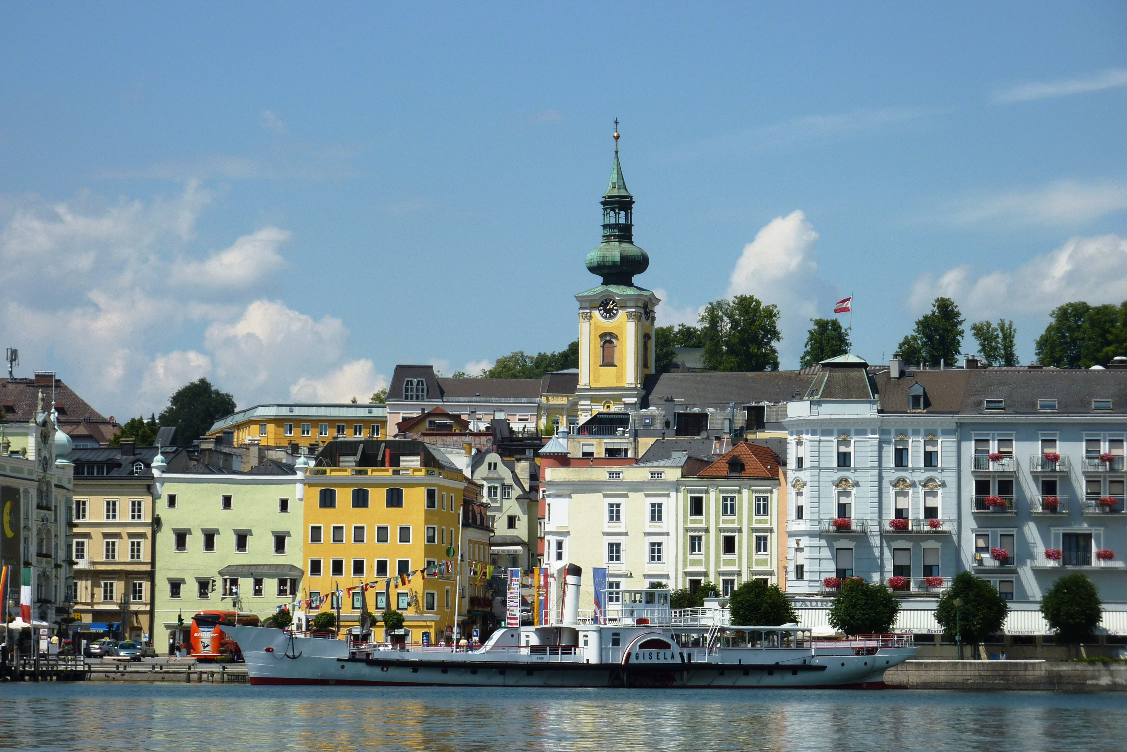 Gmunden (Österreich), vom Traunsee aus gesehen